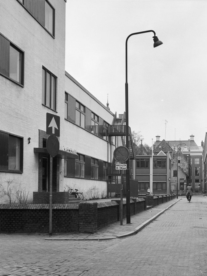 Overzichten: overzicht Butjesstraat